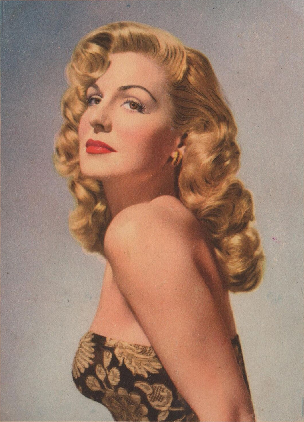 Zully Moreno, popular actriz argentina del cine clásico. Fotografía utilizada en el afiche y en las publicidades del film La calle del pecado, estrenada en 1954.